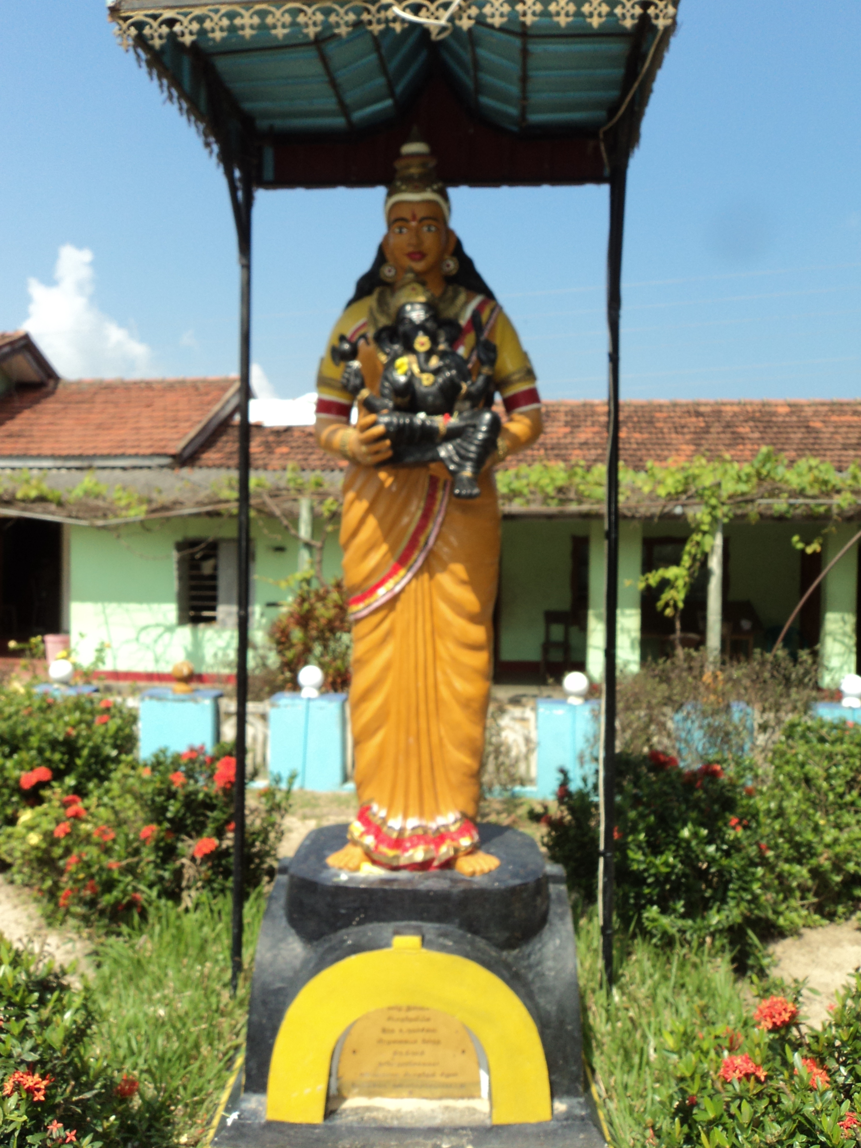 இலங்கை, வீரமுனையில் சோழ இளவரசி சீர்பாததேவி தன் திக்குவிசயத்தின் போது கண்டெடுத்த பிள்ளையார் சிலையை நிறுவினார். அதன் ஞாபகார்த்த சிலை.